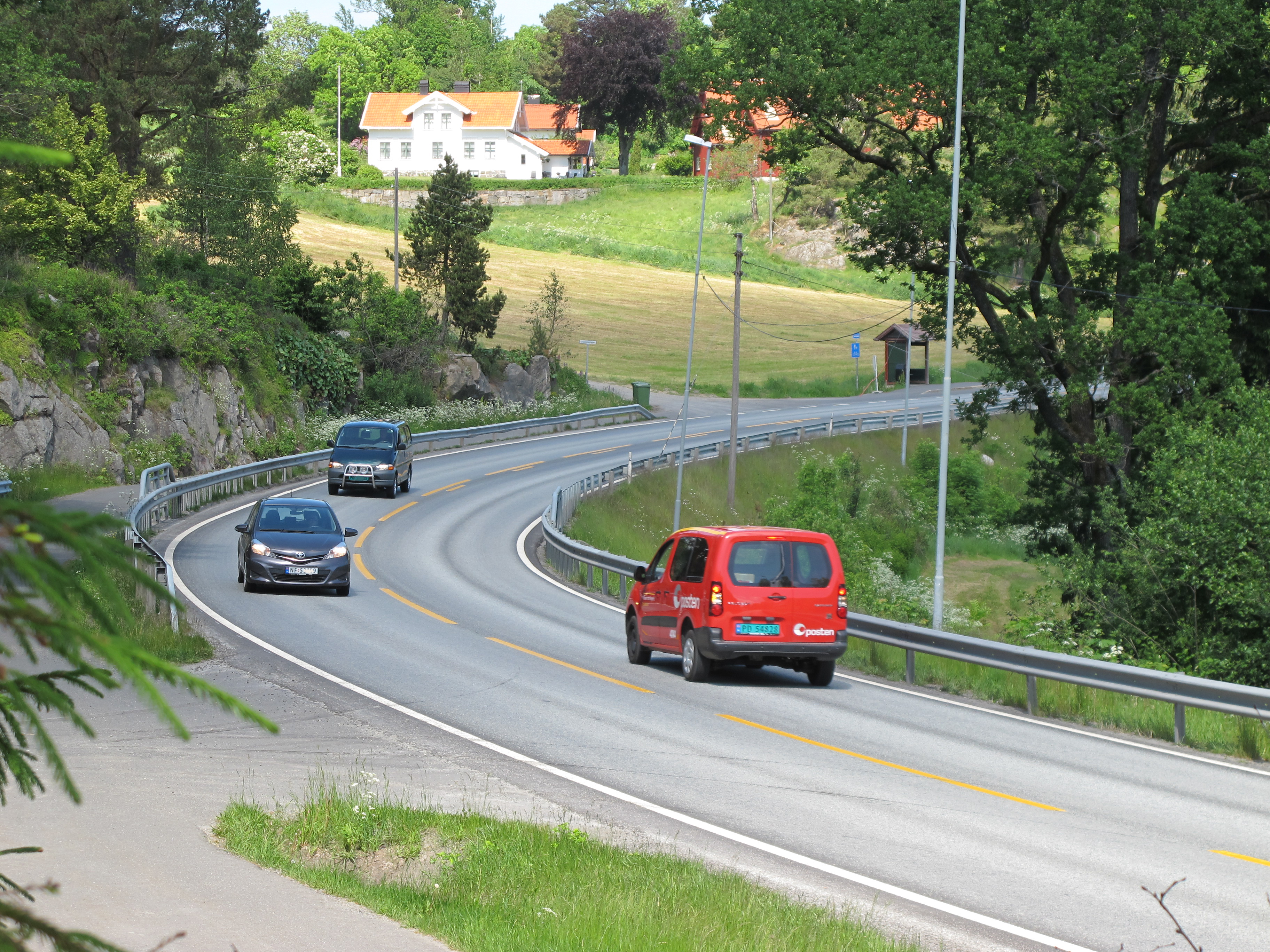 E18 i Austre Moland 2018. I 2019 åpner ny motorvei.